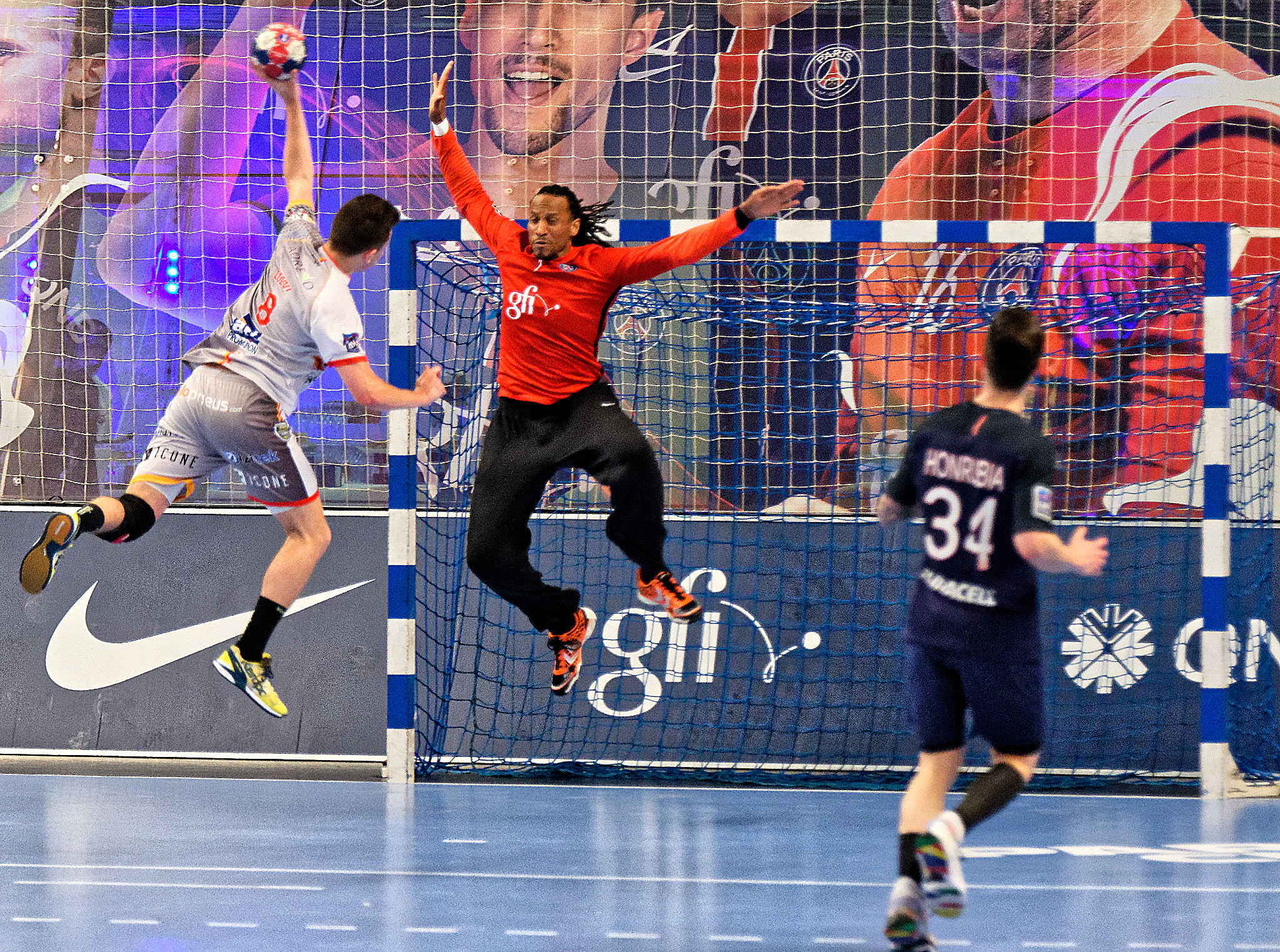 Rencontre de championnat entre le PSG et Pays d'Aix handball. A Coubertin, le 2 juin 2016.